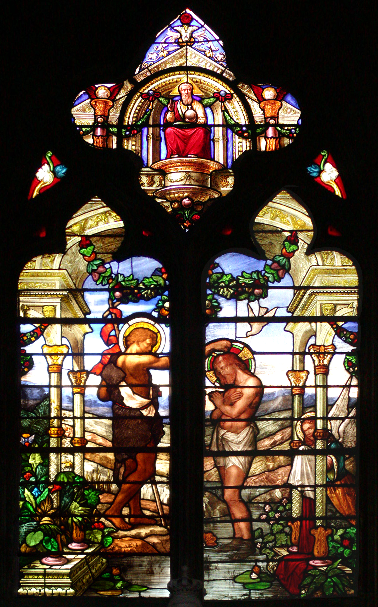 Premier vitrail de Lucien Bégule : Le vitrail des fonts baptismaux de Notre Dame des Marais à Villefranche